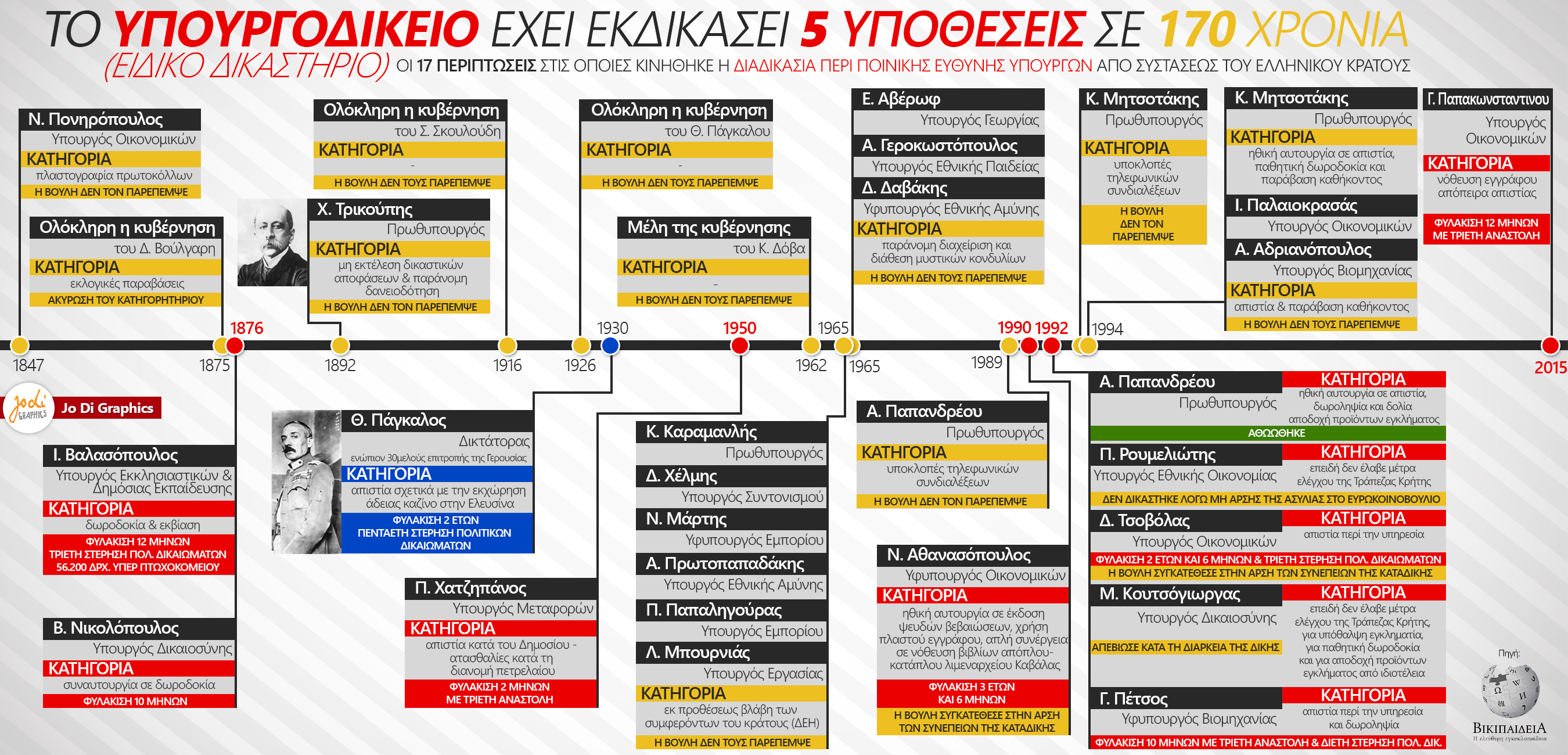 Οι 17 περιπτώσεις στις οποίες κινήθηκε η διαδικασία περί ποινικής ευθύνης υπουργών από συστάσεως του ελληνικού κράτους